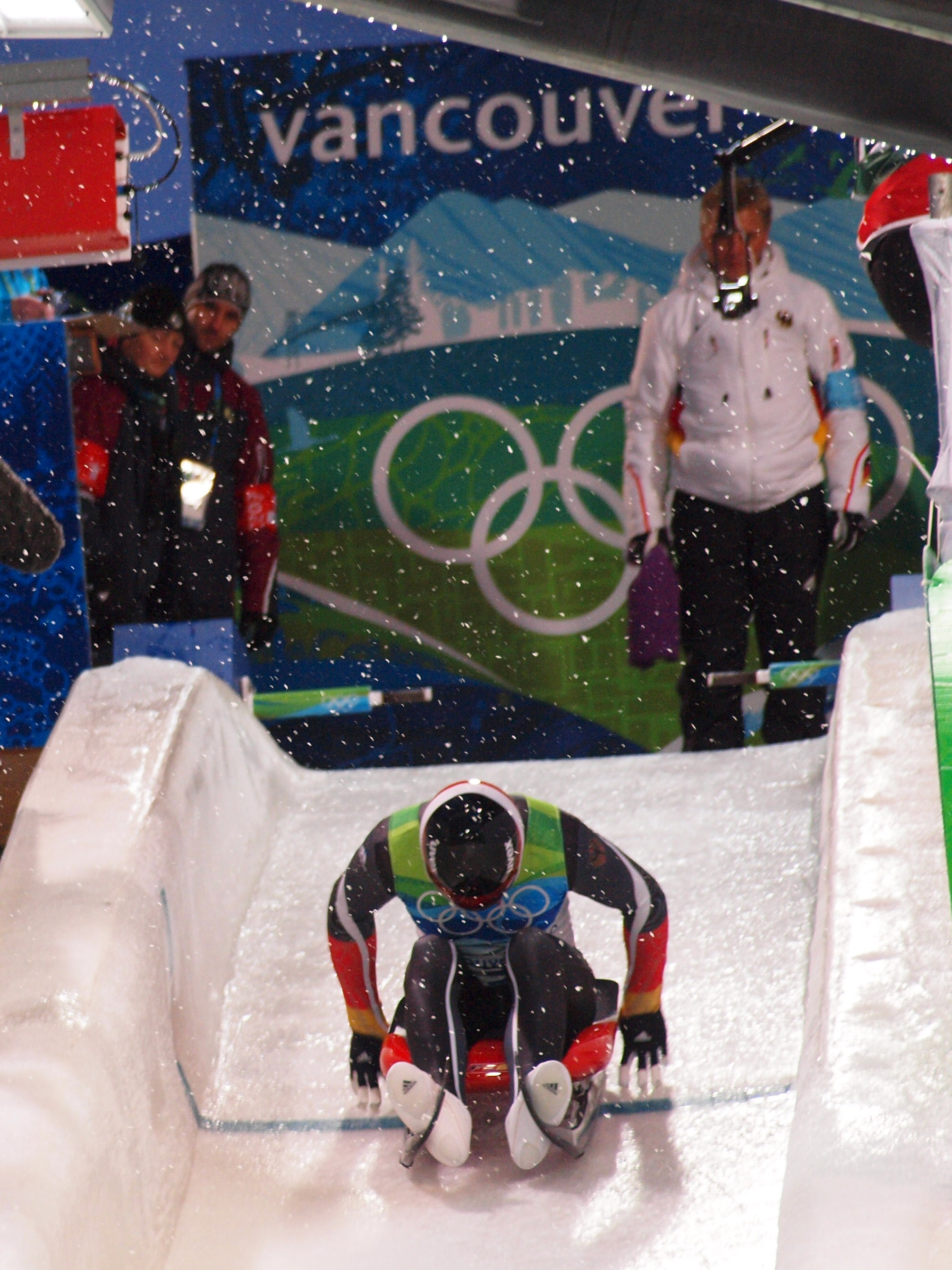 Départ d'un lugeur lors de l'épreuve olympique de Vancouver en 2010.